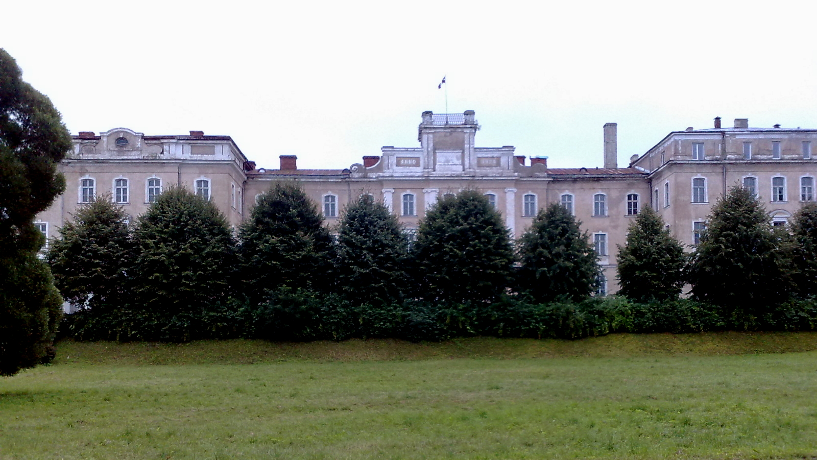 Aglonas katoļu ģimnāzija